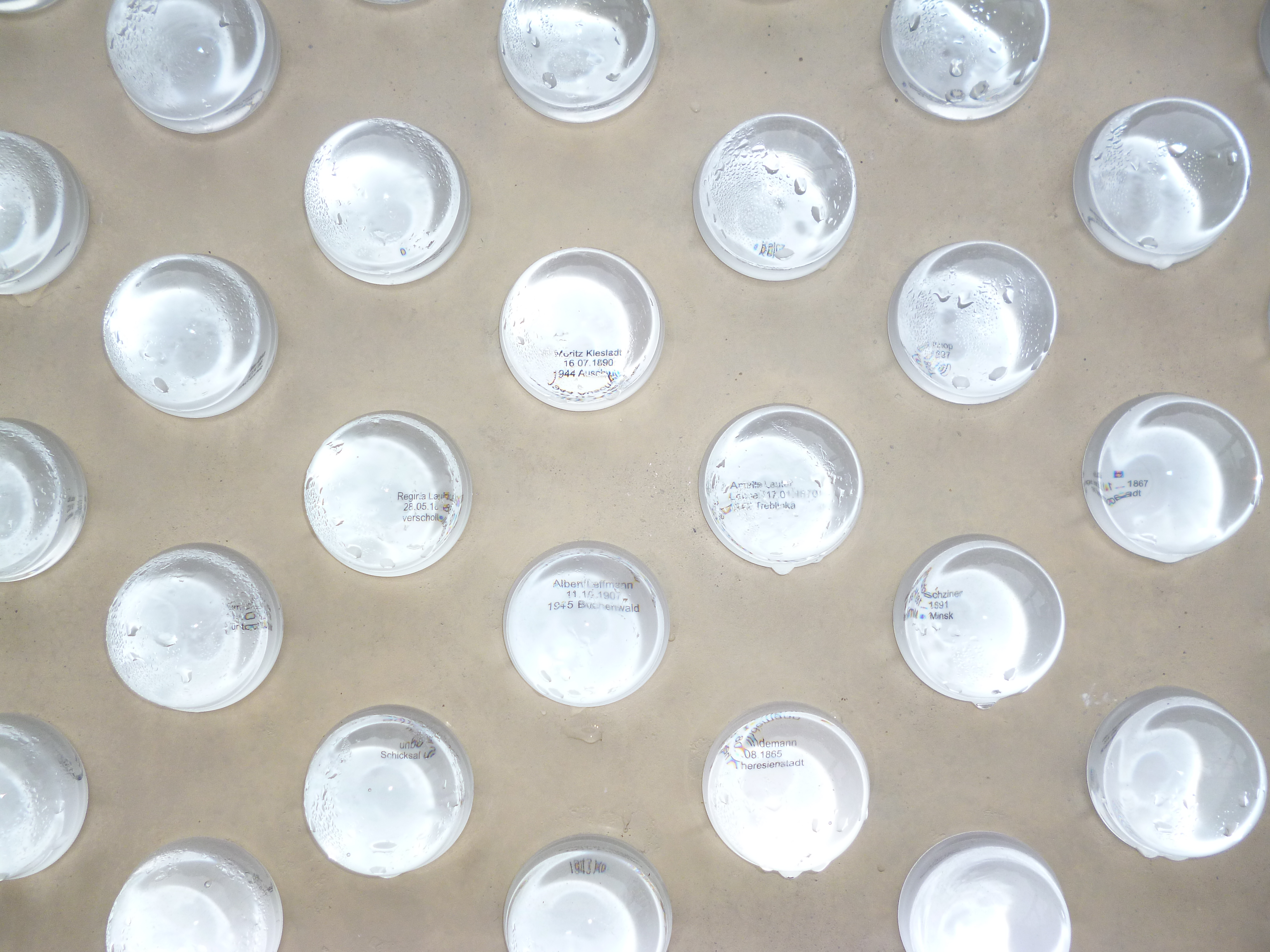 Shoah-Mahnmal, Willi-Pohlmann-Platz, Herne: in eine Gedenktafel aus gelblich eingefärbtem Faserbeton mit Edelstahlbewehrung eingelasse Okulare aus Glas mit den Namen sowie Geburts- und Todesdaten und Todesorten der Opfer aus Herne und Wanne-Eickel.